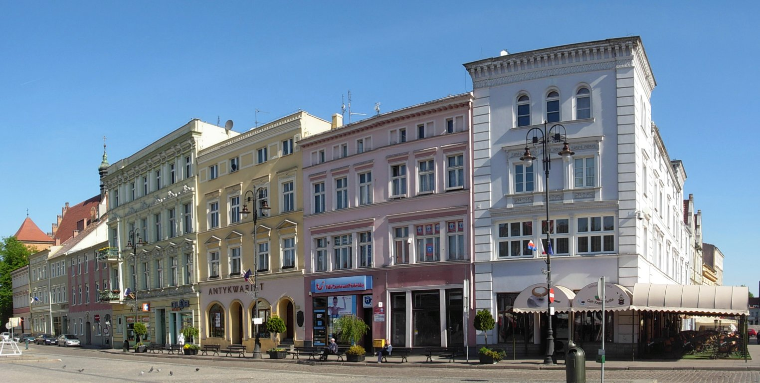 Stary Rynek w Bydgoszczy - pierzeja północna